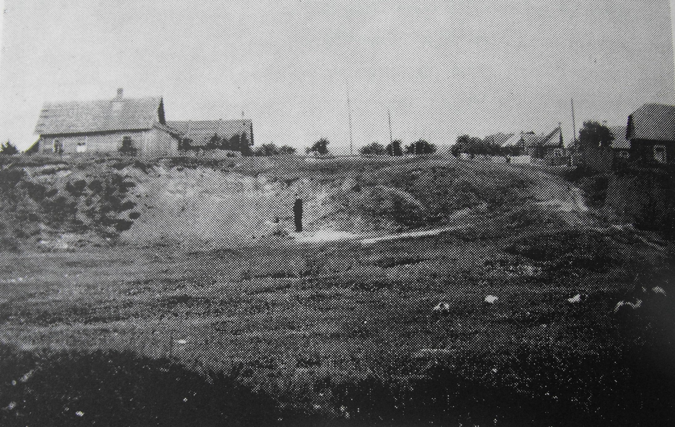 Песчаный карьер в Докшицах, во время Второй мировой войны ставший местом массовых убийств нескольких тысяч евреев - узников Докшицкого гетто. Сейчас на этом месте возведен мемориал в память об убитых.